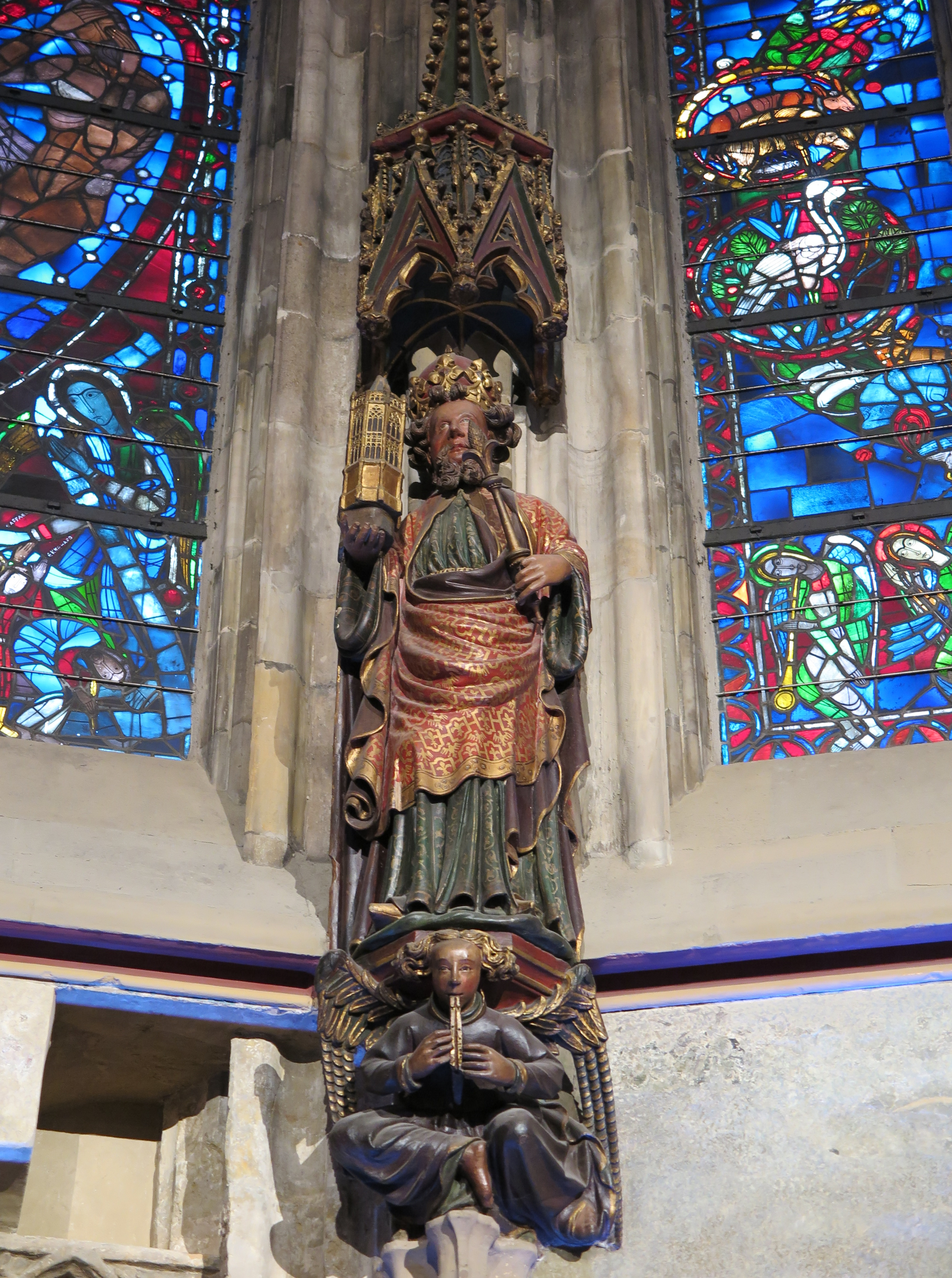 Statue von Karl dem Großen in der Chorhalle des Aachener Doms. In der Hand hält er ein Modell des Aachener Münsters. Aachen Cathedral Native nameAachener DomLocationAachen, GermanyCoordinates50° 46′ 29.1″ N, 6° 05′ 02.12″ E Established796Web page control : Q5908 VIAF: 130198000 LCCN: n81107086 UNESCO: 3 GND: 4126584-1 SUDOC: 027486567 WorldCat institution QS:P195,Q5908